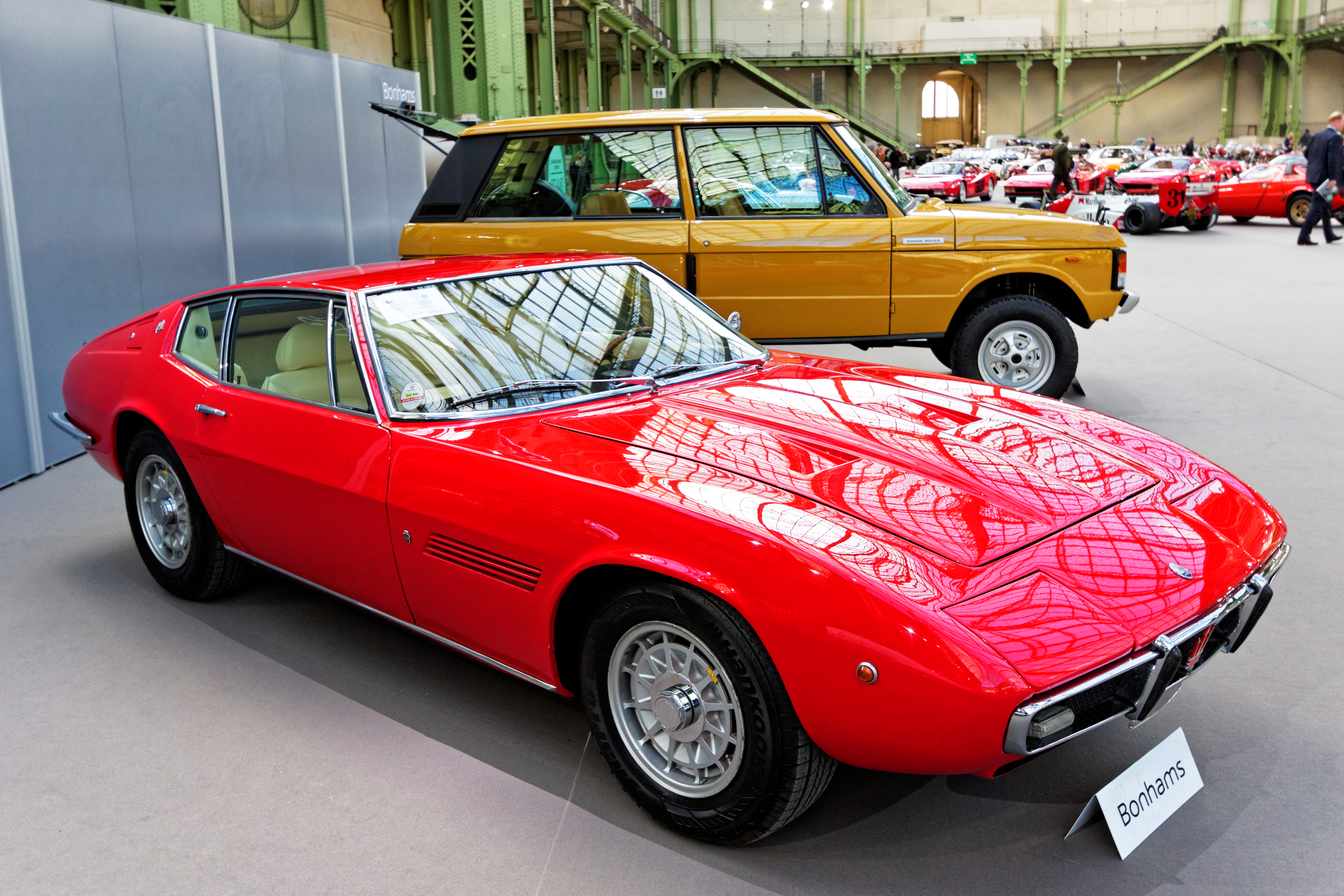 Un des véhicules présenté lors de la vente aux enchères Bonhams 2016 au Grand Palais de Paris.